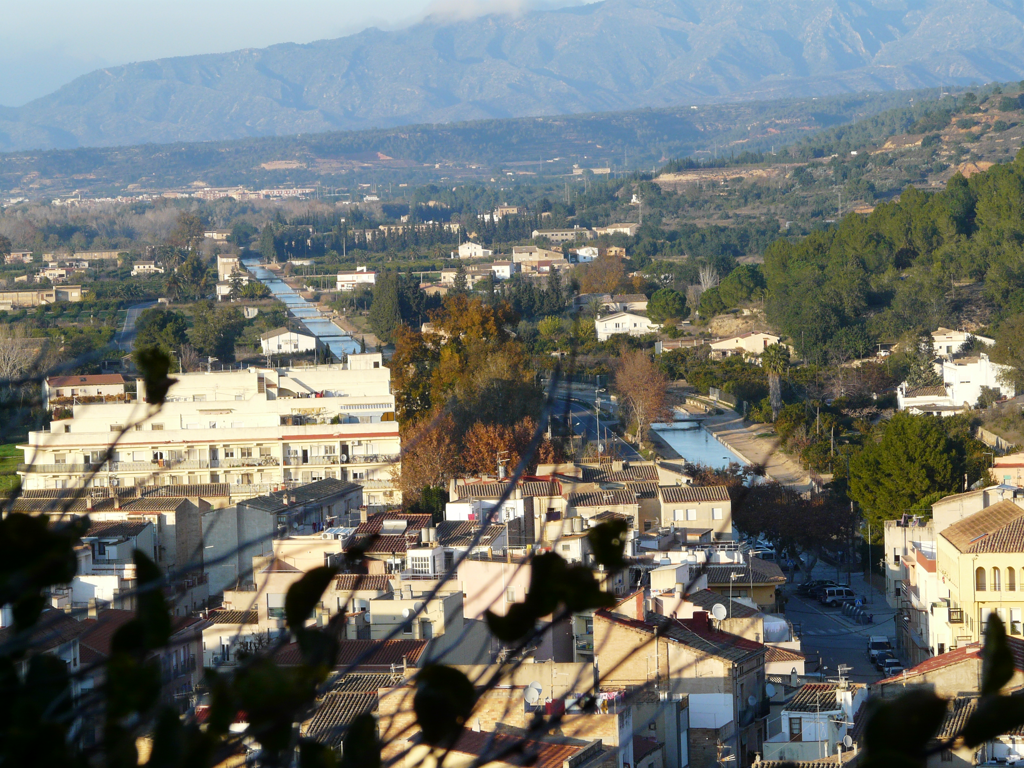 Serres de Cardó-el Boix (Baix Ebre, Ribera d'Ebre) (Tortosa, Tivenys, Benifallet i altres). This is a a photo of a natural area in Catalonia, Spain, with id: ES510198 Object location40° 54′ 36″ N, 0° 35′ 24″ E